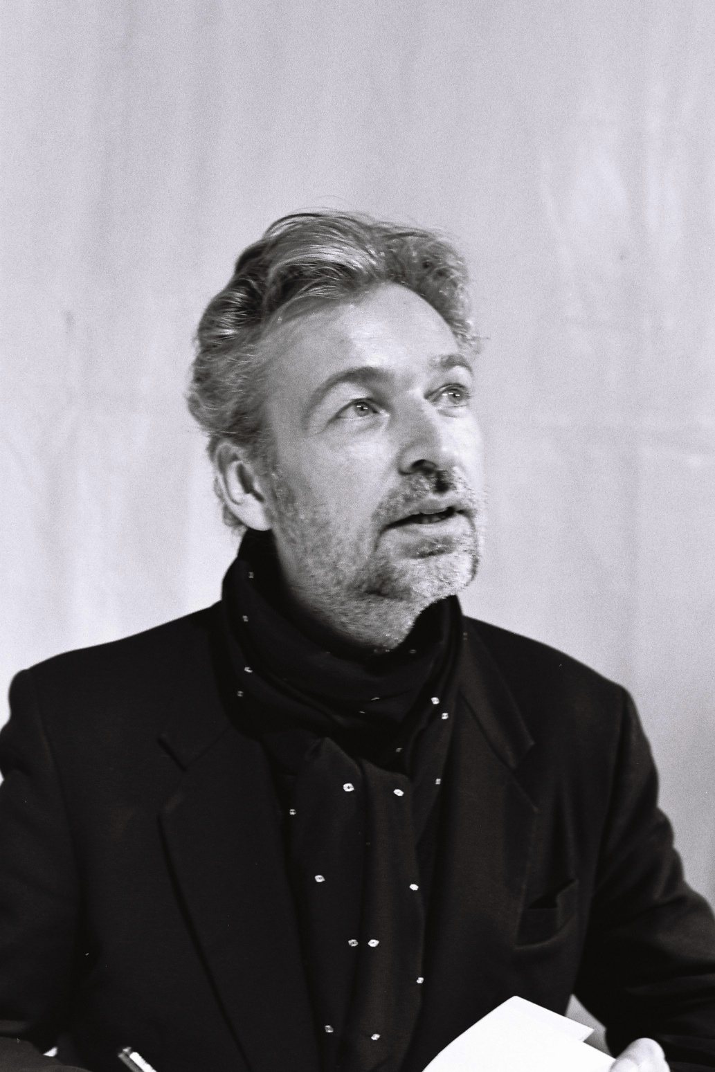 Éric Reinhardt au salon du livre Radio France, 26 novembre 2011